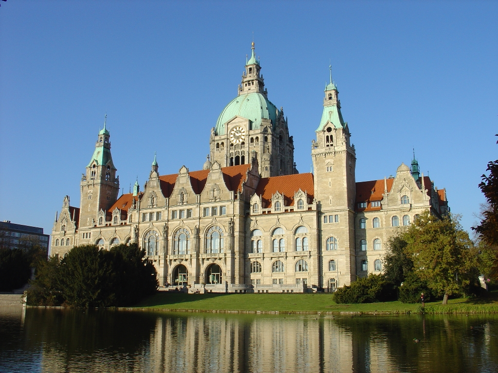 Blick vom Maschteich zur Gartenfassade, Neues Rathaus in Hannover